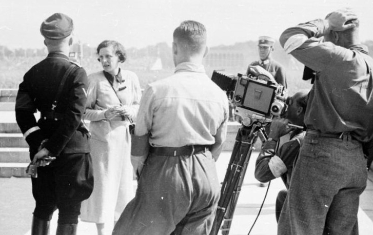 Nürnberg, Leni Riefenstahl mit Heinrich Himmler Leni Riefenstahl mit Heinrich Himmler (links) während des Reichsparteitags Nürnberg 1934 in der Luitpold-Arena bei Aufnahmen zu ihrem Film "Triumph des Willens" 9.9.1934 Abgebildete Personen: Riefenstahl, Leni: Filmproduzentin, Regisseurin, Schauspielerin, Fliegerin, Bundesrepublik Deutschland (GND 118600761) Himmler, Heinrich: Reichsführer der SS, Deutschland (GND 11855123X)